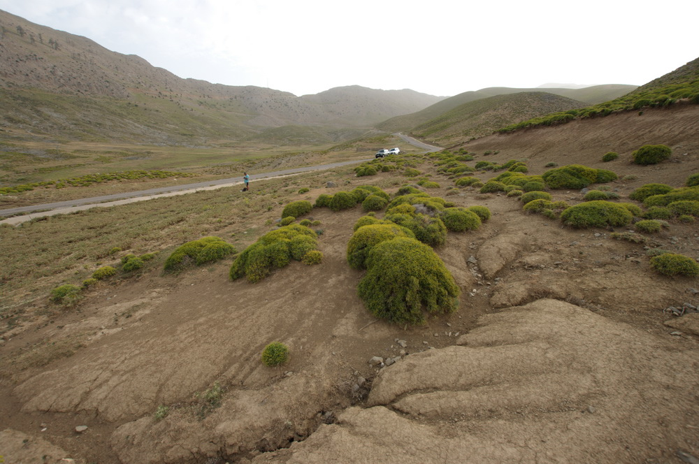 matorral de Bupleurum spinosum al pie del Bou Iblane.